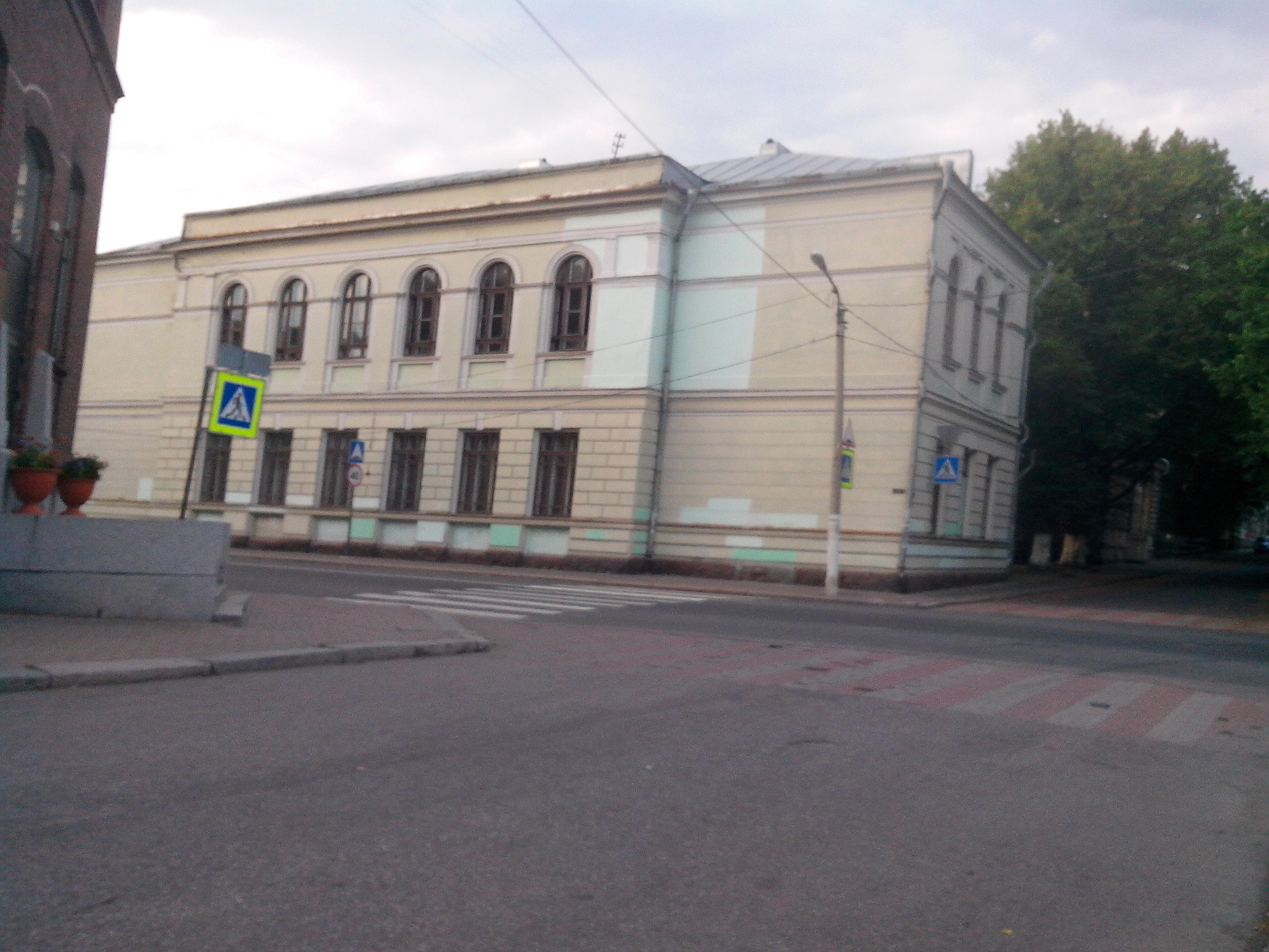 спортивная Школа в Выборге